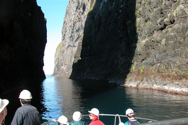 Vestmannabjørgini